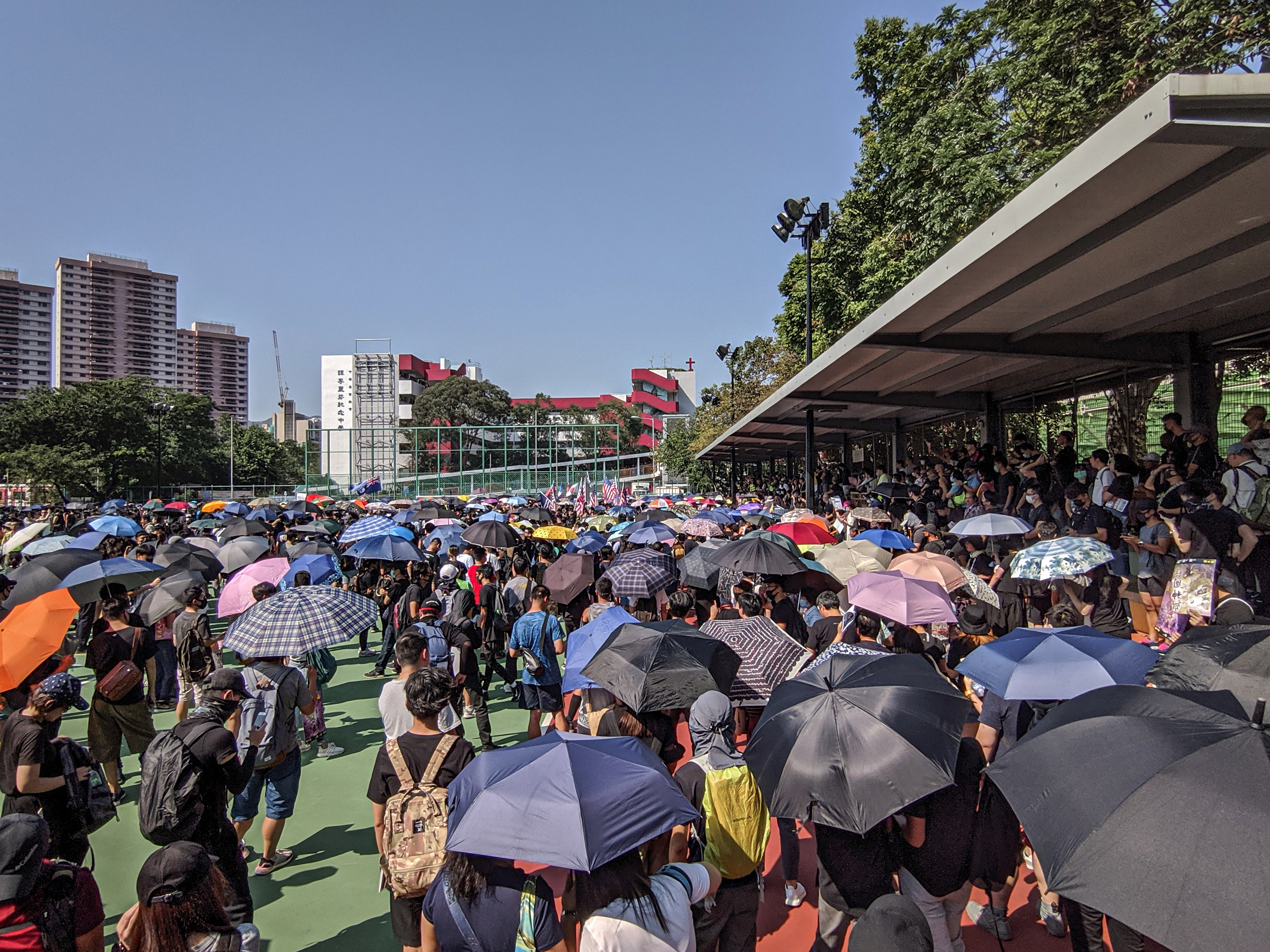 2019-09-22 Tuen Mun 光復屯門公園遊行